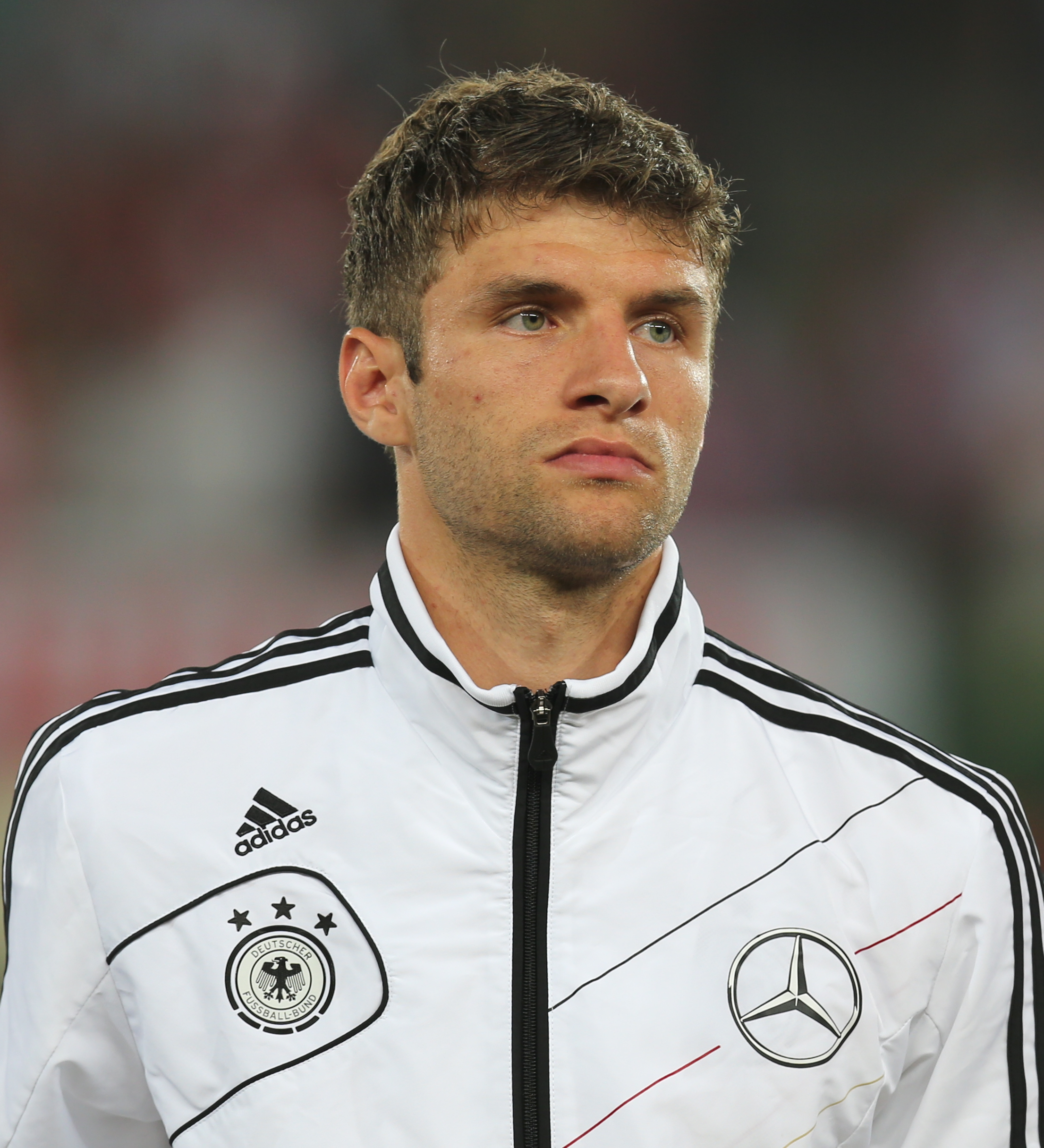 Fußball-Weltmeisterschaft 2014/Qualifikation (UEFA), Gruppe C, 11. September 2012, Österreich gegen Deutschland im Wiener Ernst-Happel-Stadion. The making of this work was supported by Wikimedia Austria. For other files made with the support of Wikimedia Austria, please see the category Supported by Wikimedia Österreich.